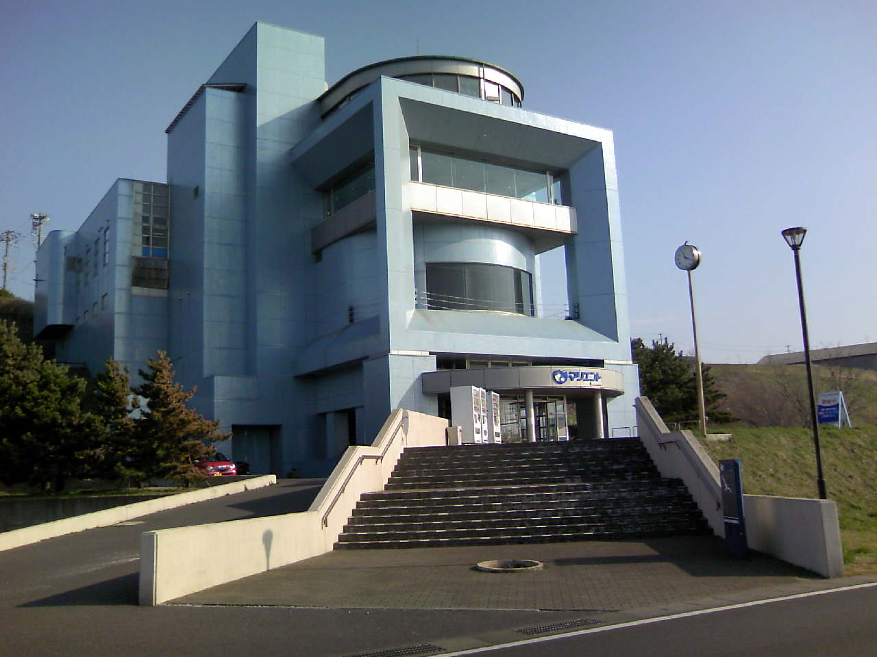 八戸市水産科学館（マリエント）(Marient - HACHINOHE, AOMORI, JAPAN)